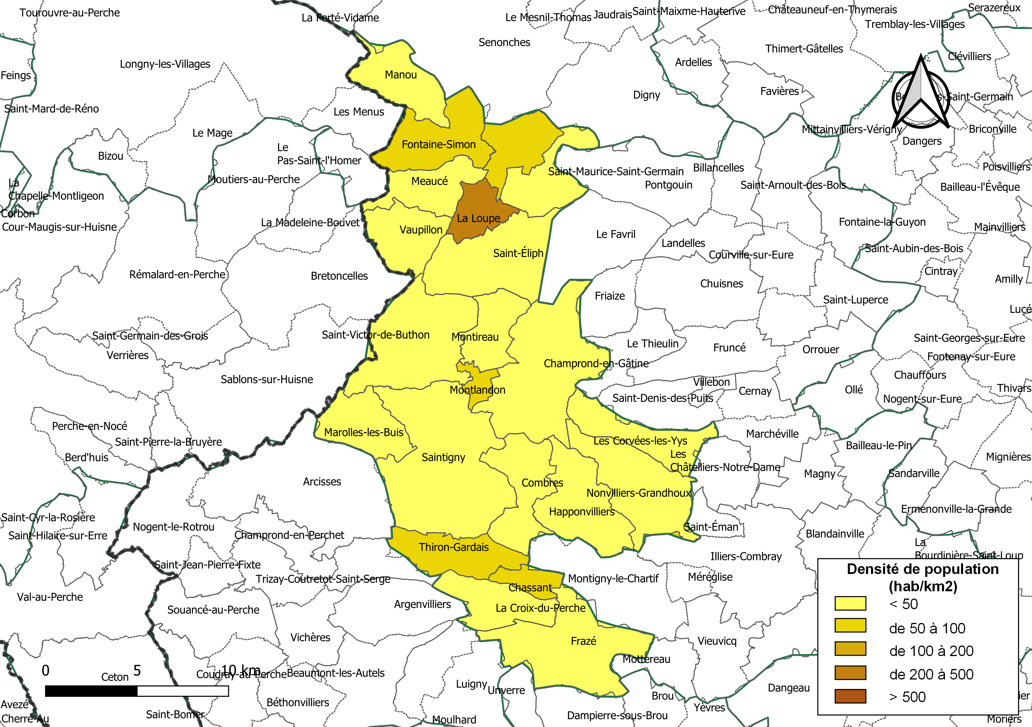 Carte des densités de population (millésimée 2016) des communes de la communauté de communes la Communauté de communes Terres de Perche, département d'Eure-et-Loir, France. Composition au 1er janvier 2019.